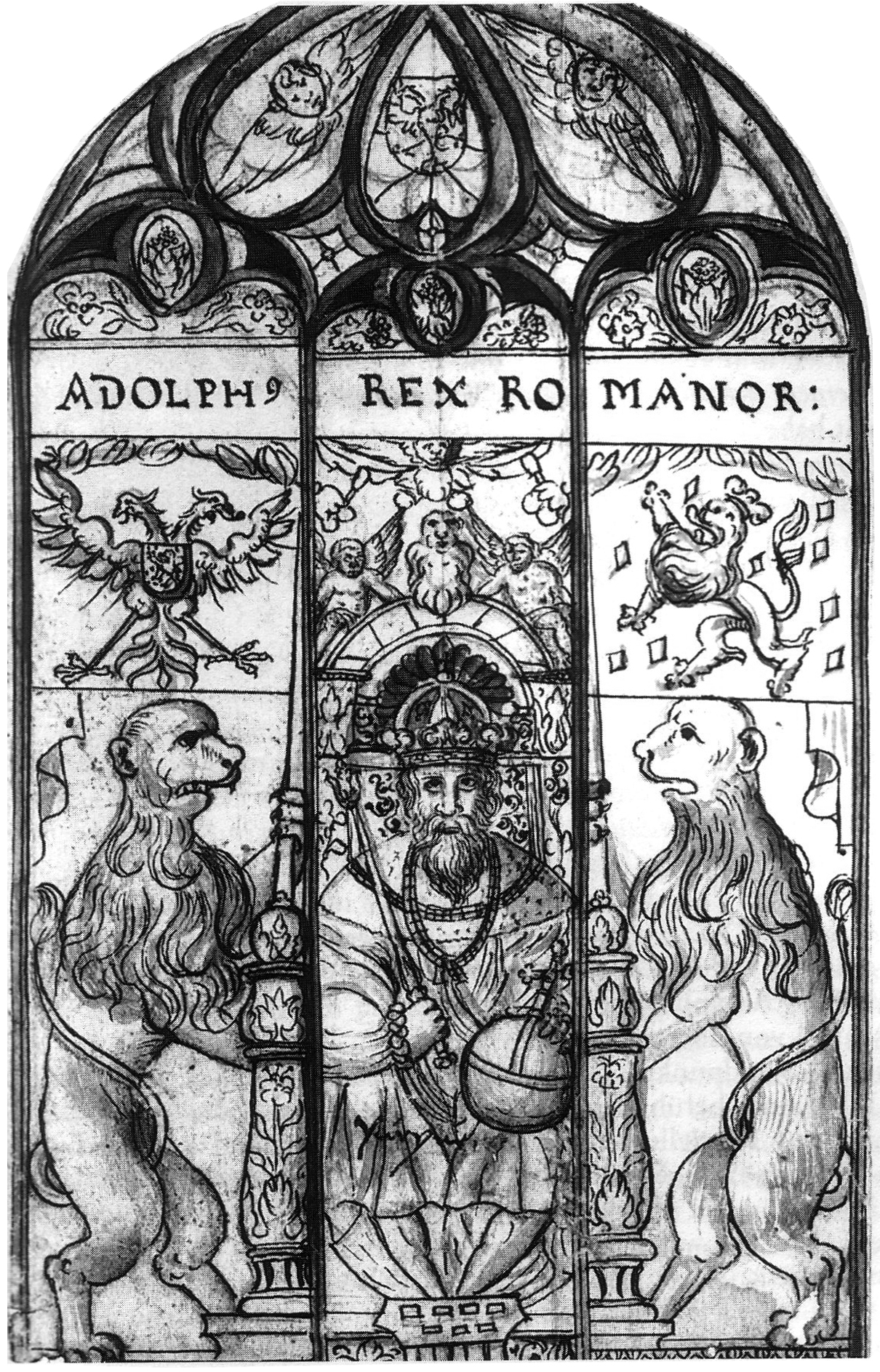 Adolf von Nassau. Zeichnung des Glasfensters von 1556 (Mauritiuskirche Wiesbaden) von H. Dors 1632